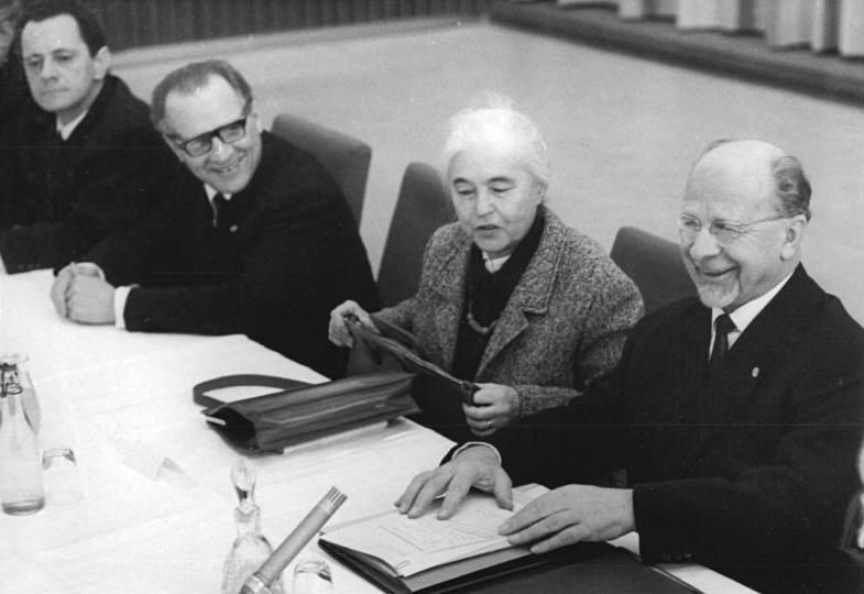 Berlin, Schriftsteller bei Walter Ulbricht Zentralbild Kohls 25.11.1965 Berlin: Schriftsteller bei Walter Ulbricht Der Vorsitzende des Staatsrates der DDR und Erster Sekretär des ZK der SED, Walter Ulbricht, empfing am 25.11.1965 Schriftsteller zu einem Gespräch. Vrnl: Walter Ulbricht, Anna Seghers, Erich Honecker und Dieter Noll. Abgebildete Personen: Noll, Dieter: Schriftsteller, DDR (GND 119157322) Honecker, Erich: Staatsratsvorsitzender, Generalsekretär des ZK der SED, DDR (GND 118553399) Seghers, Anna: Schriftstellerin, Präsidentin des Schriftstellerverbandes, DDR (GND 118612743) Ulbricht, Walter: Staatsratsvorsitzender, Erster Sekretär des Zentralkomitees (ZK) der SED, Vorsitzender des Nationalen Verteidigungsrates, DDR